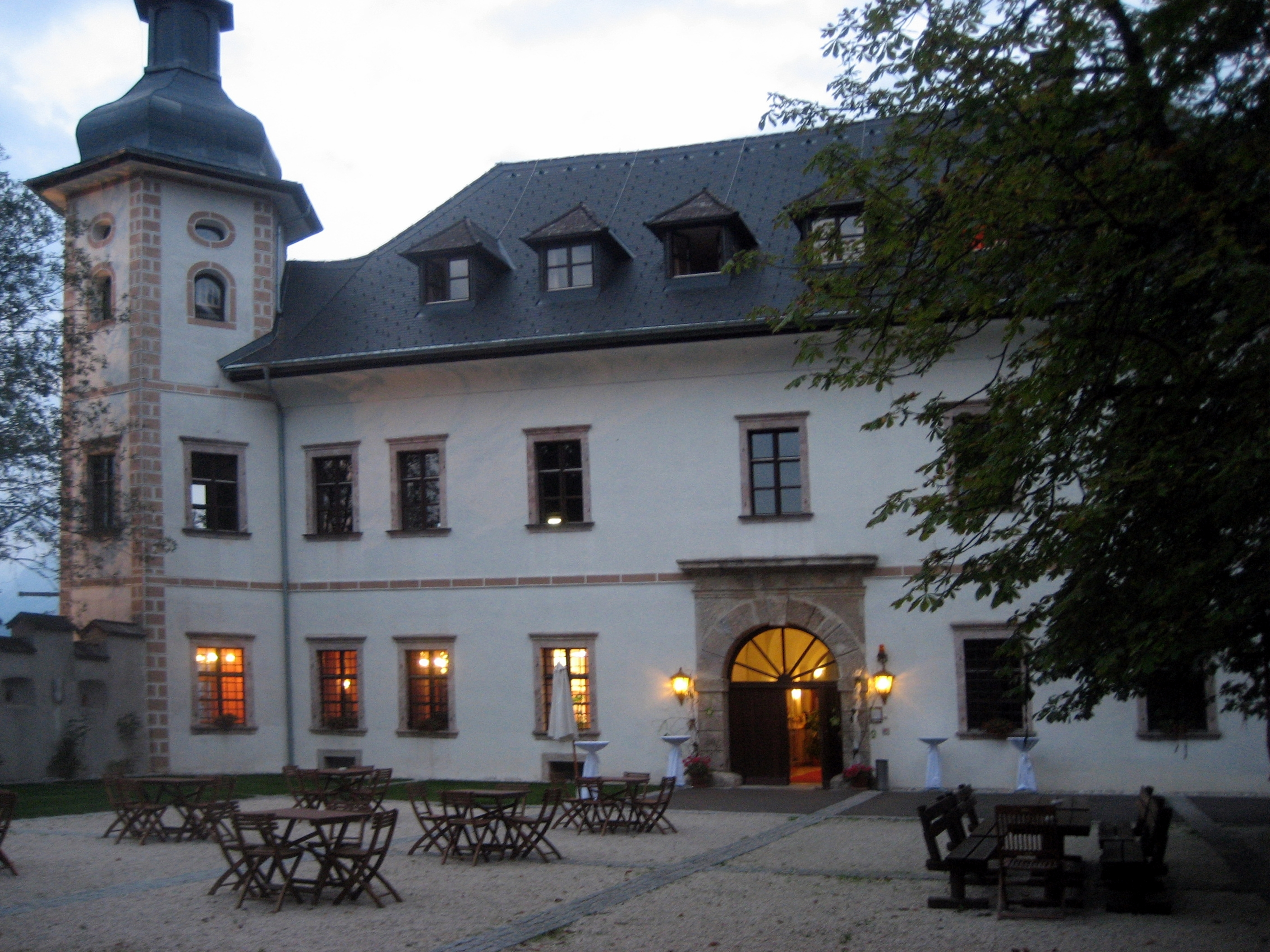 Schloss Röthelstein Aussenansicht